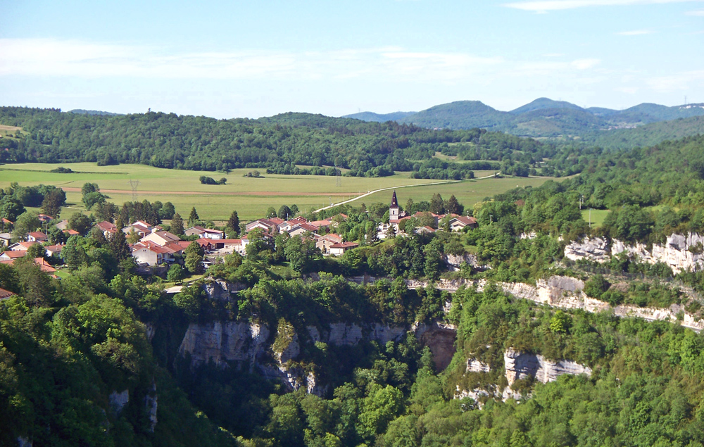 Le village de Corveissiat